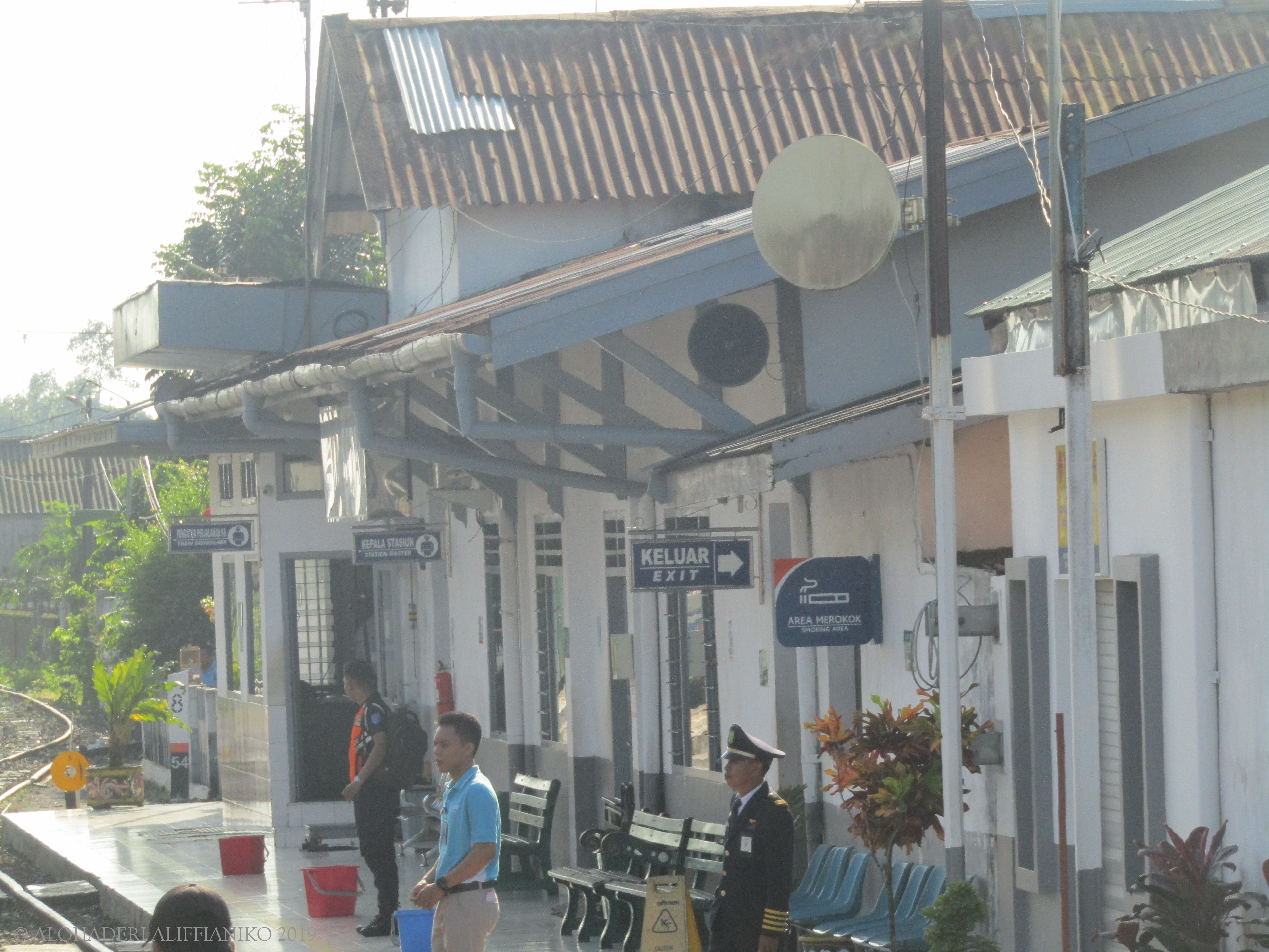 Stasiun Kalisetail, dilihat dari peron